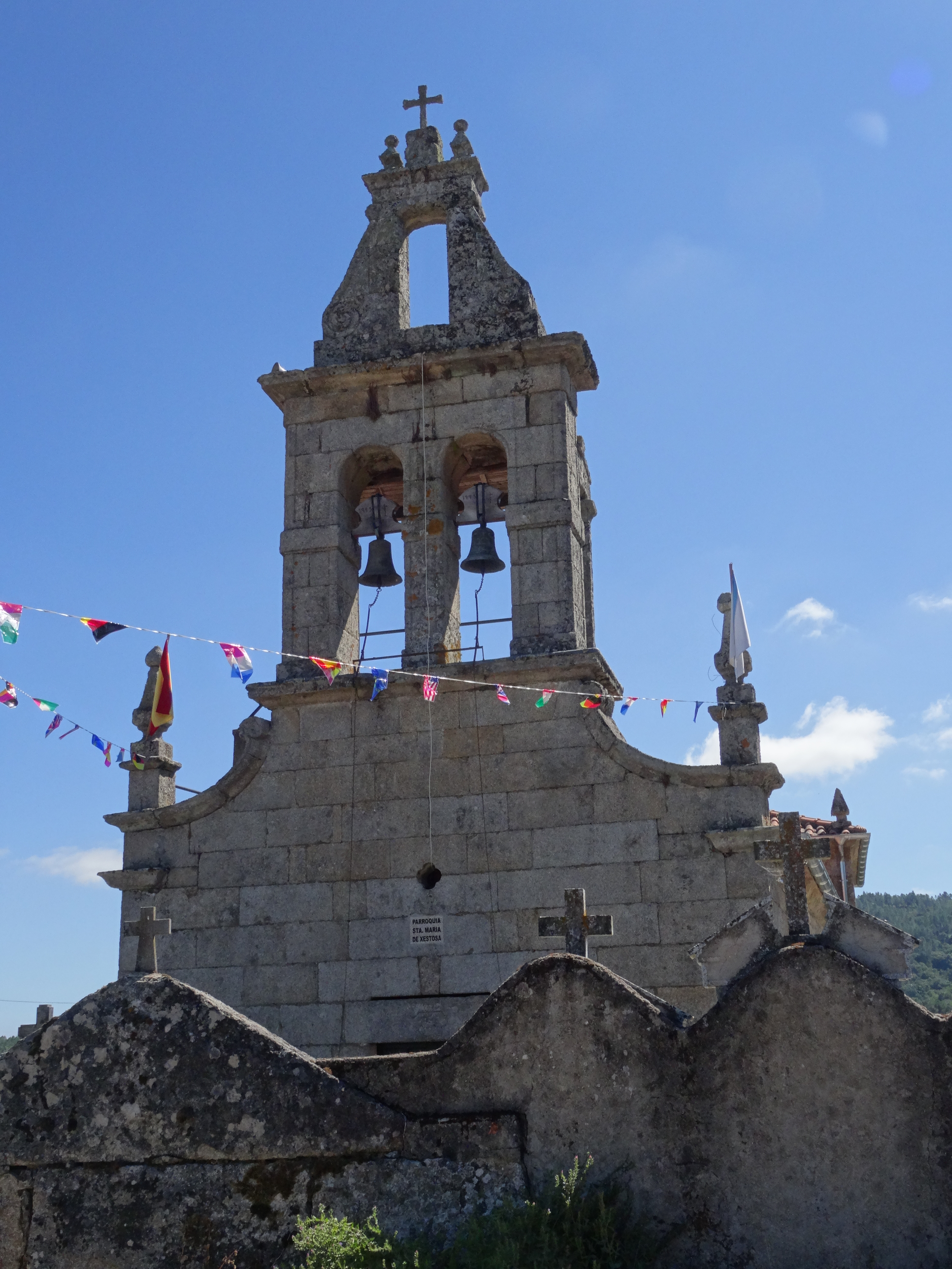 Ver título.